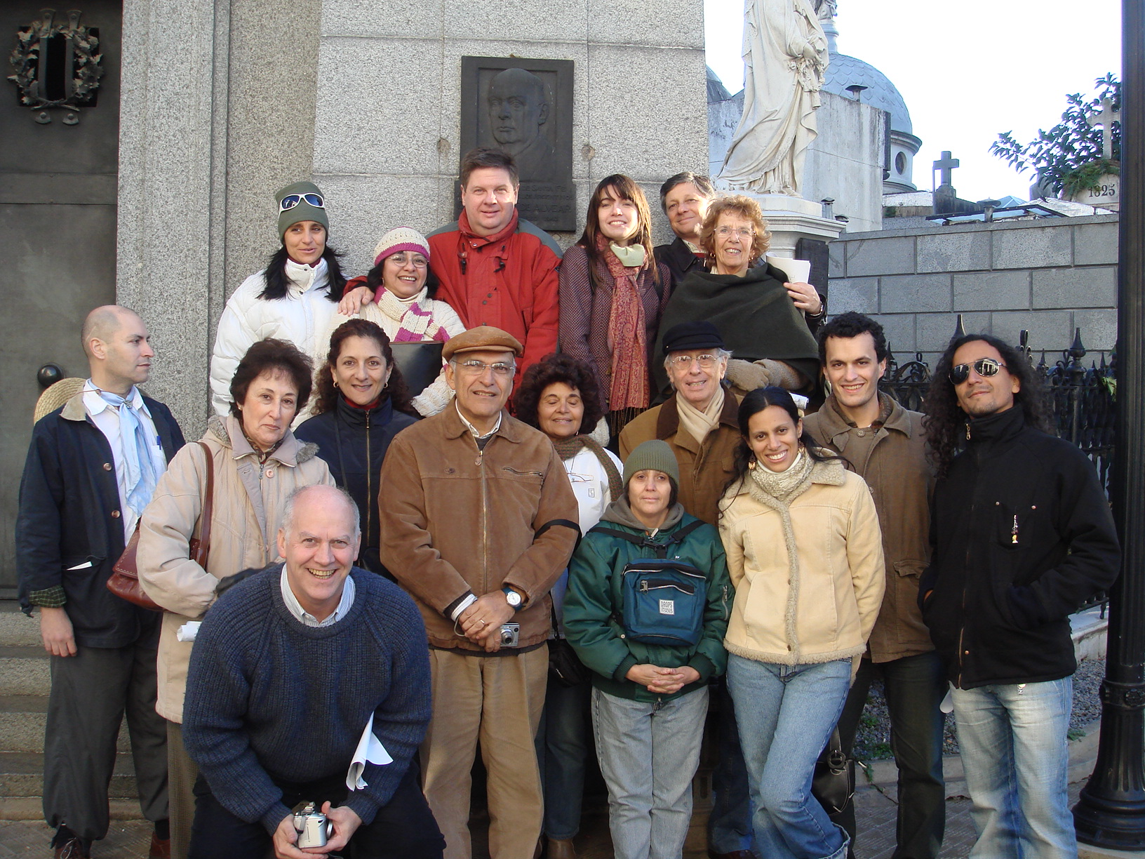 Grupo de Cicerones de Buenos Aires con visitantes, en un paseo por el Cementerio de la REcoleta